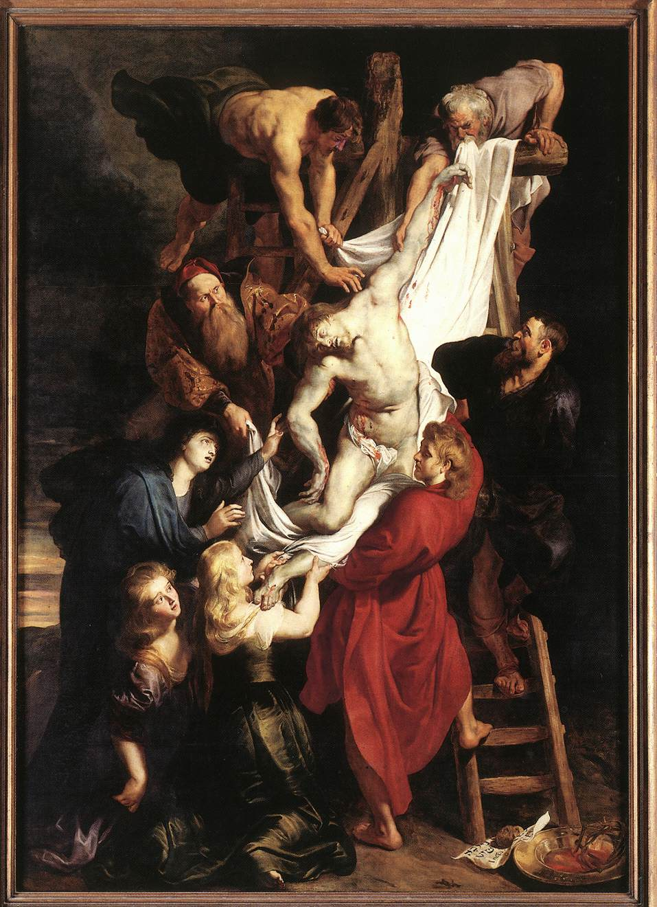 centre panel